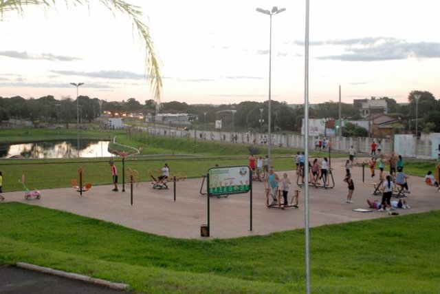 Parque Sucupira, em Naviraí, Brasil